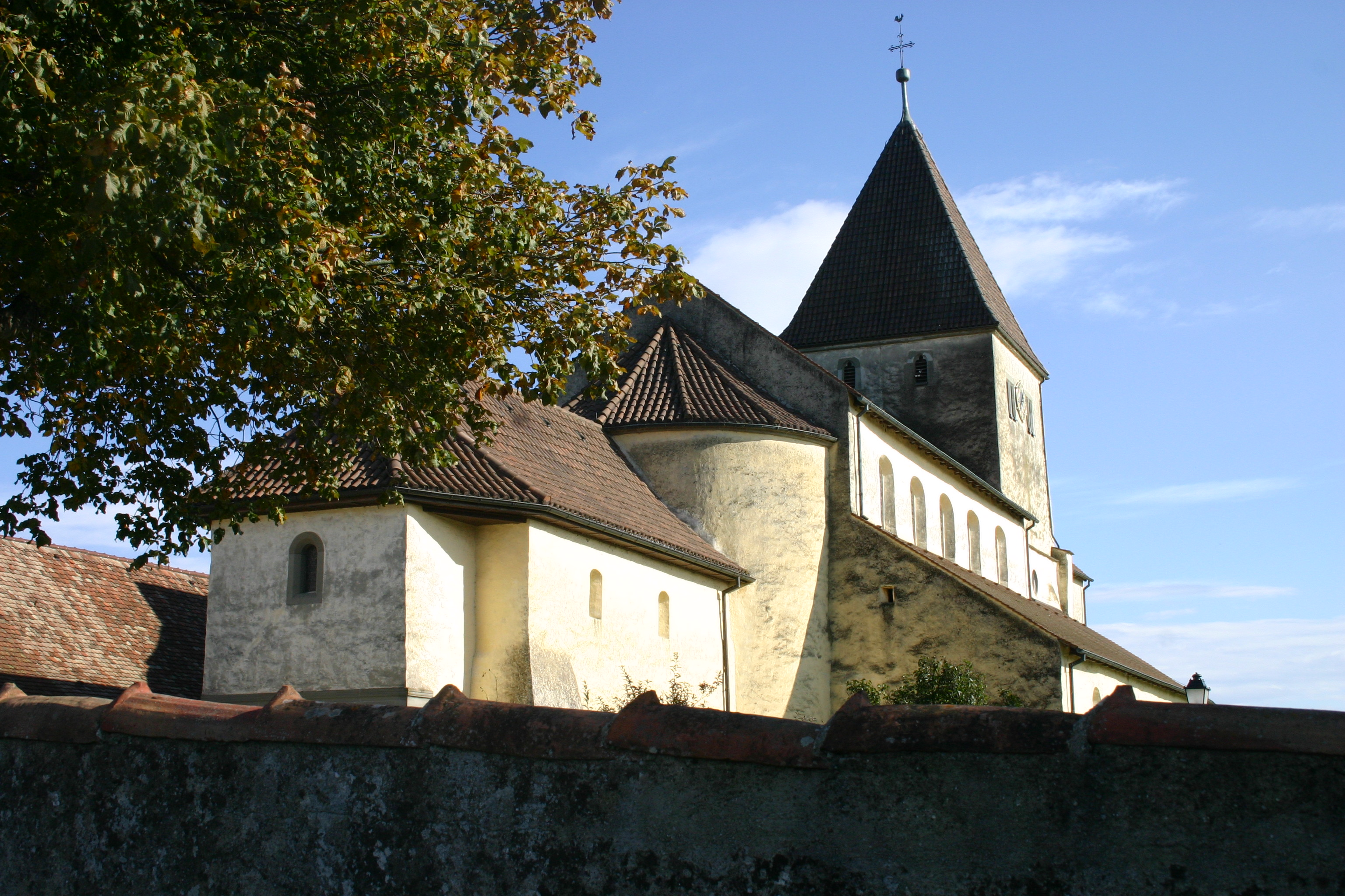 Kirche St. Georg, Reichenau-Oberzell